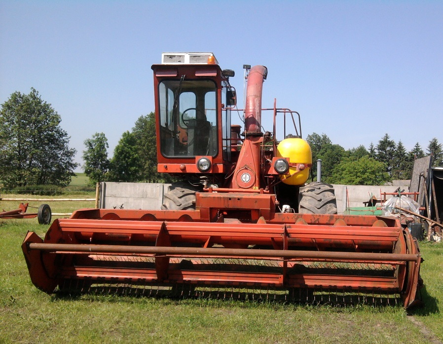 Sieczkarnia Z350/3 z przyrządem Z341 - przód